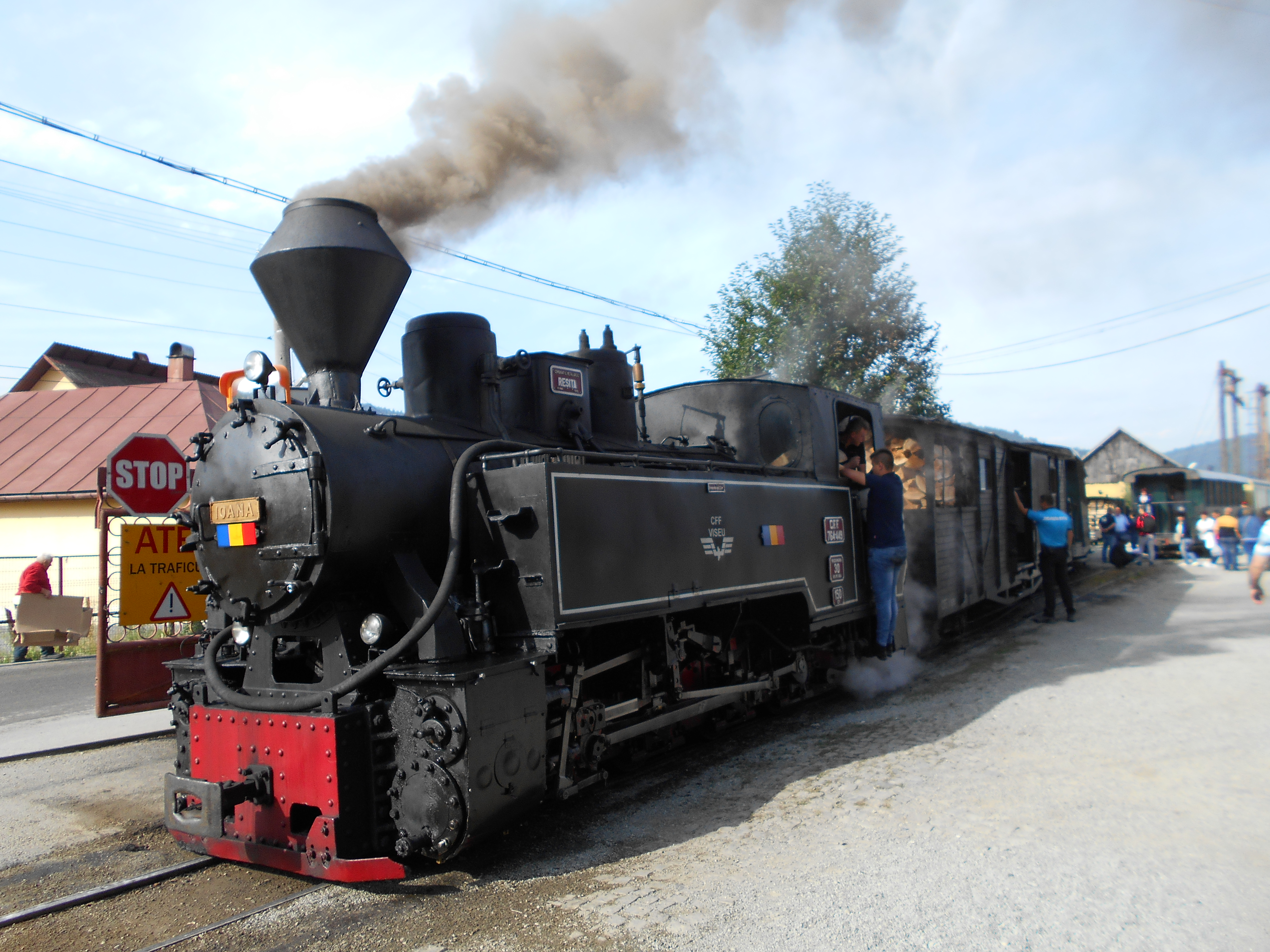 treno a vapore e scartamento ridotto, Mocănița, Vişeu de Sus, Maramureş